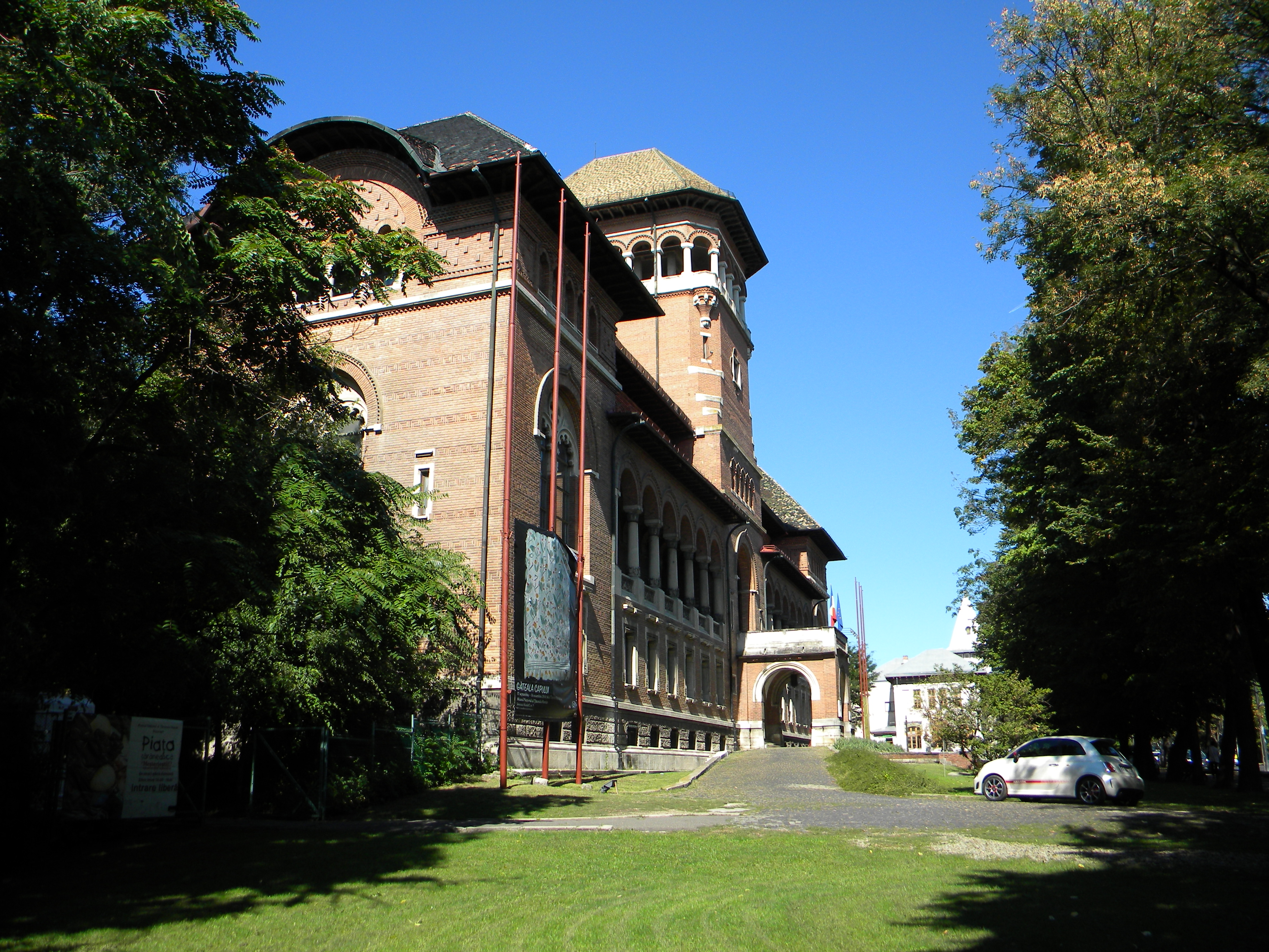 Bucuresti, Romania, Muzeul Taranului Roman; B-II-m-A-18985 (1)